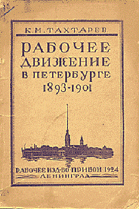 K. M. Tachtarev, "Il movimento operaio di Pietroburgo (1893-1901)", Leningrad, Priboj, 1924